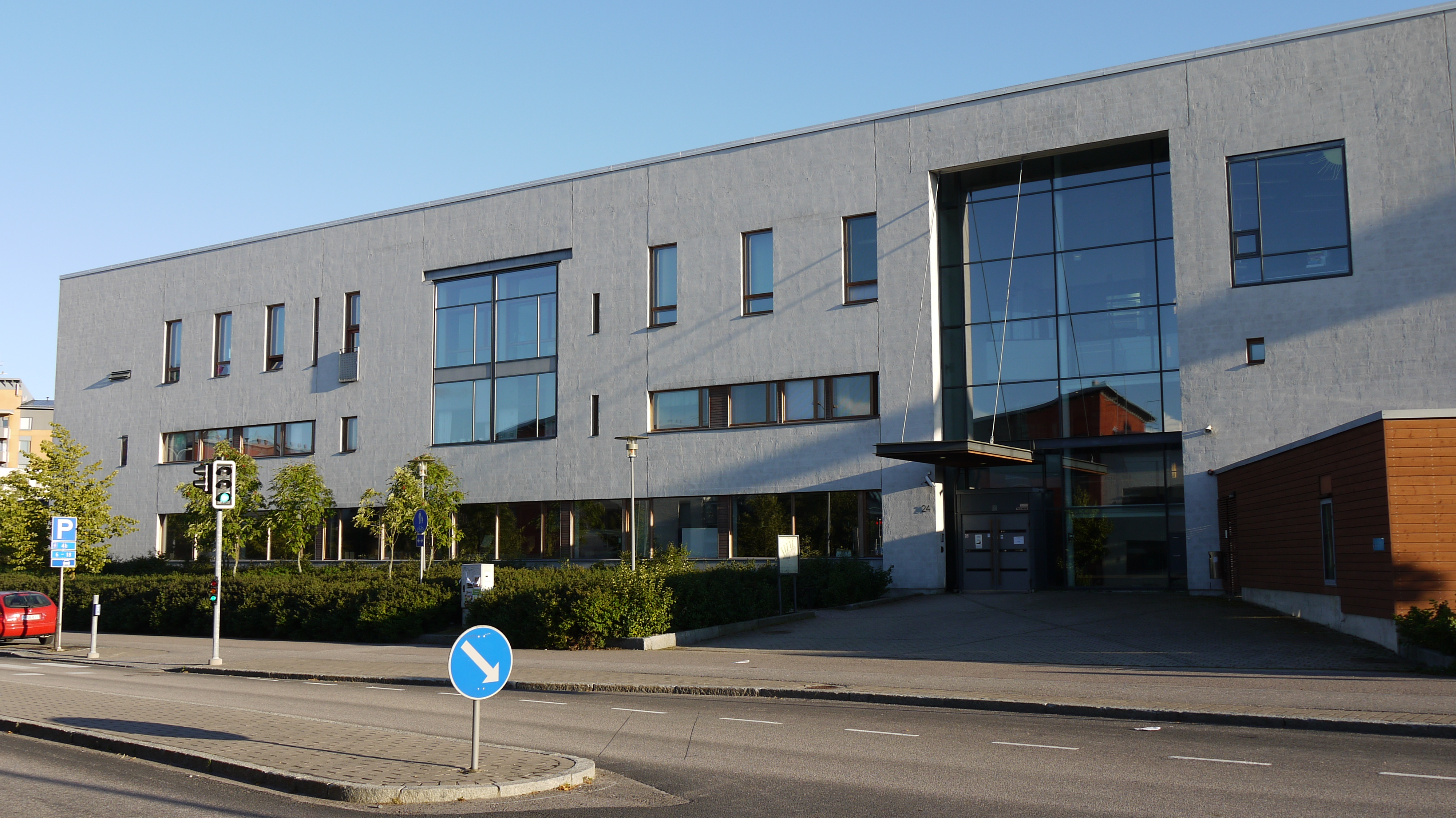 Ruusuntorpan koulu Espoon Leppävaarassa